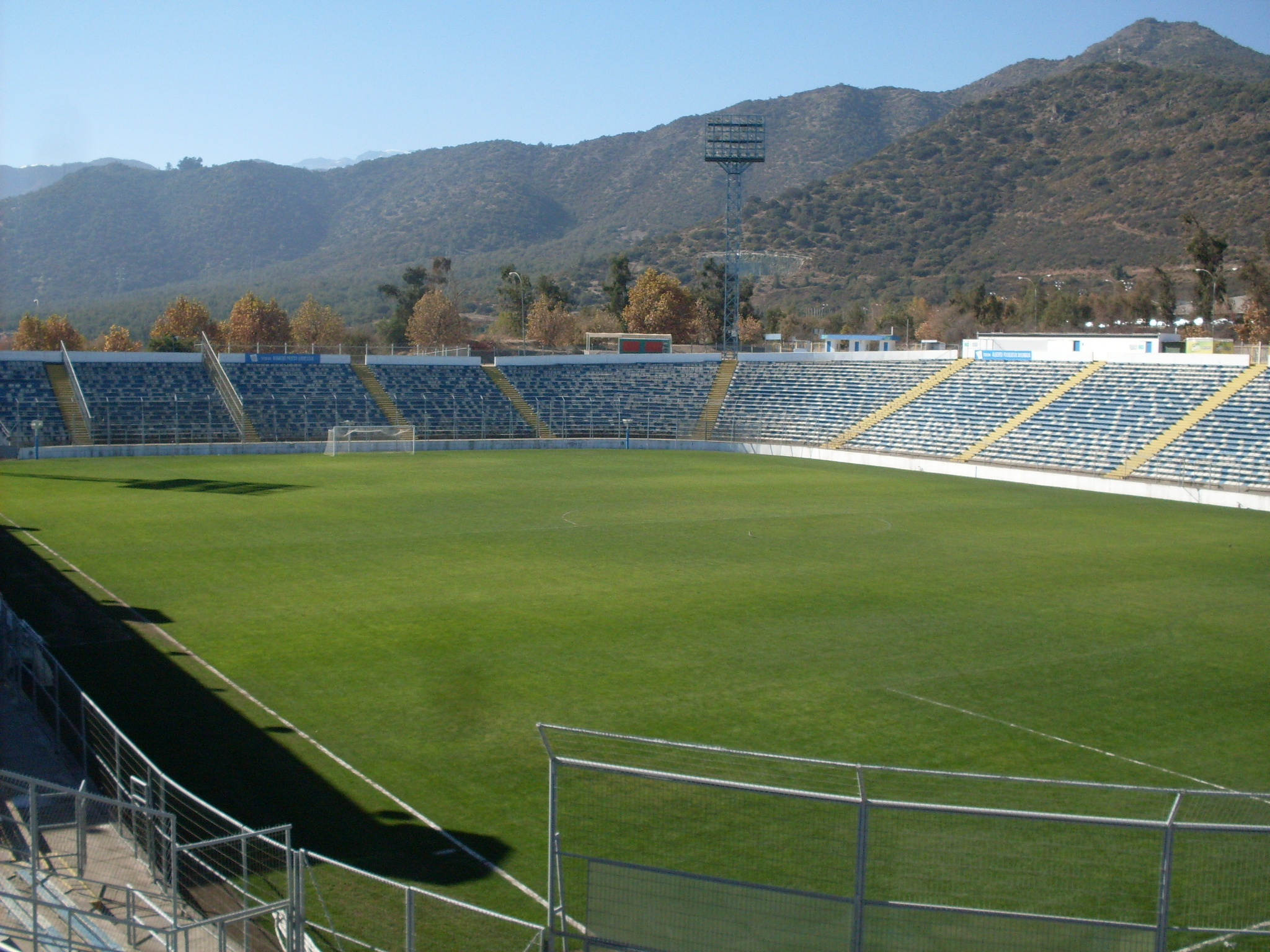 Estadio San Carlos de Apoquindo desde Tribuna Mario Lepe